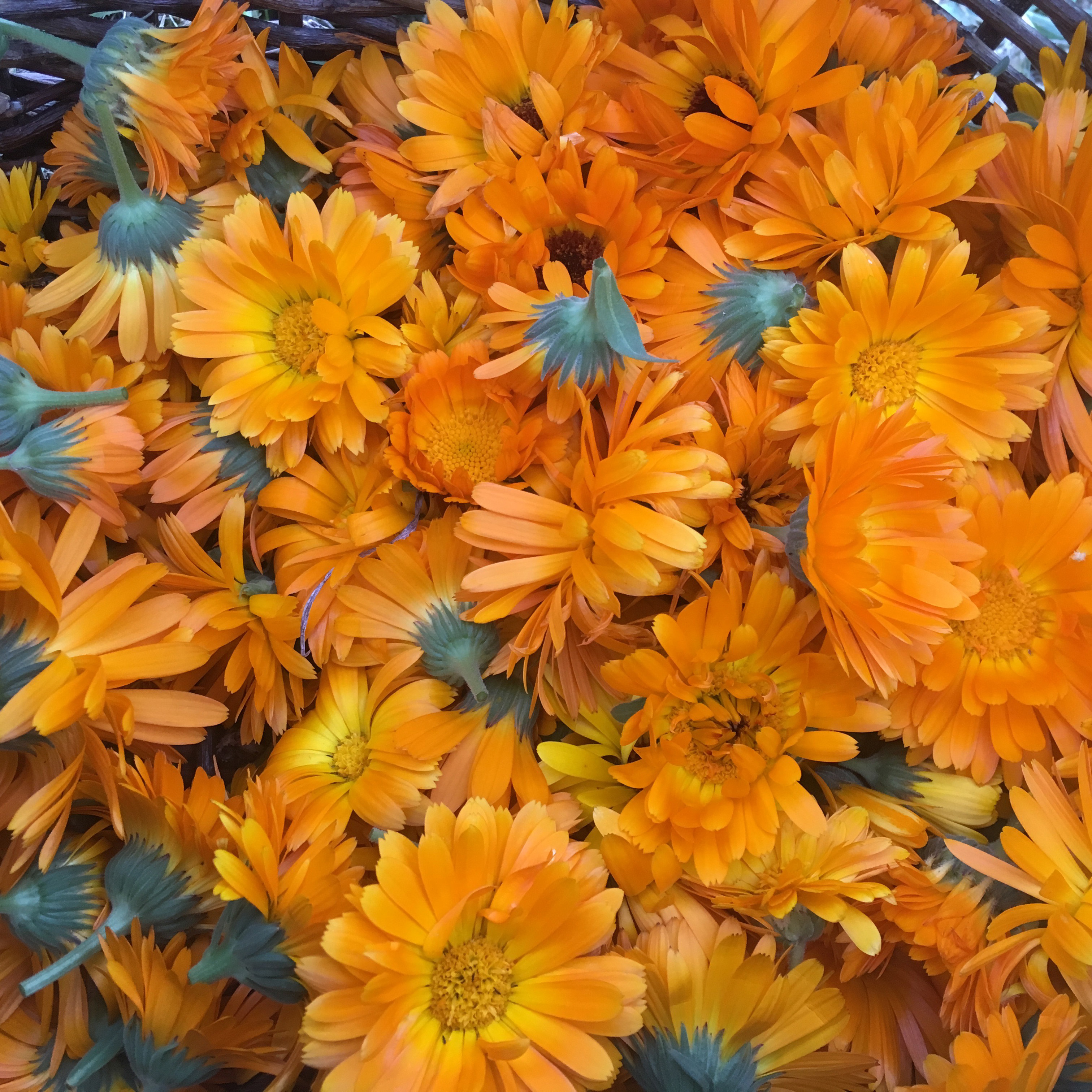 Cueillette de soucis (calendulas) avant transformation en huile de calendula